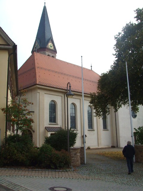 Pfarrkirche St. Afra, Obernheim, Zollernalbkreis, Baden-Württemberg